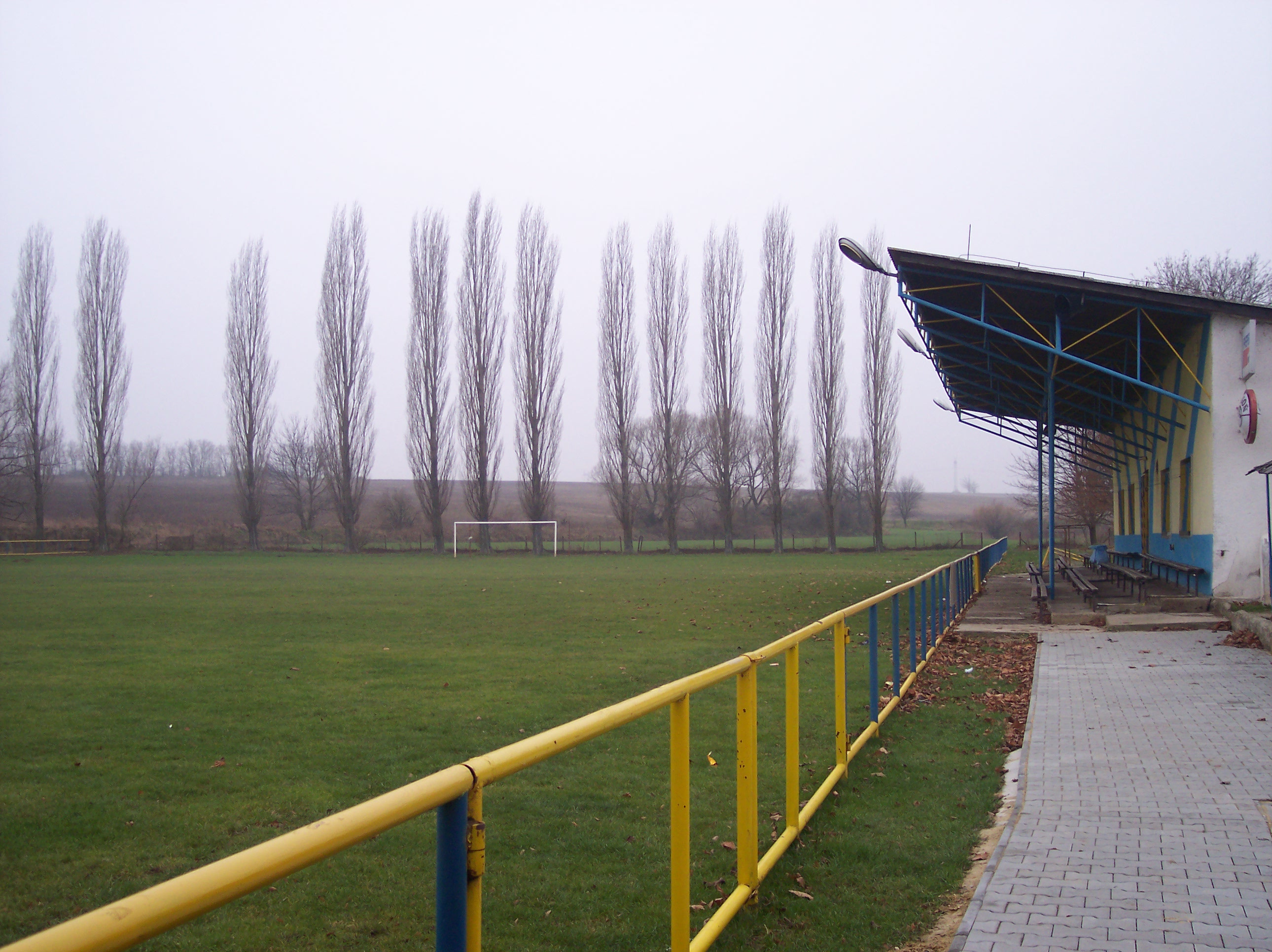 Futbalový štadión v Lukáčovciach.